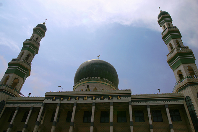 Dongguan mosque in Xining, Qinghai, China